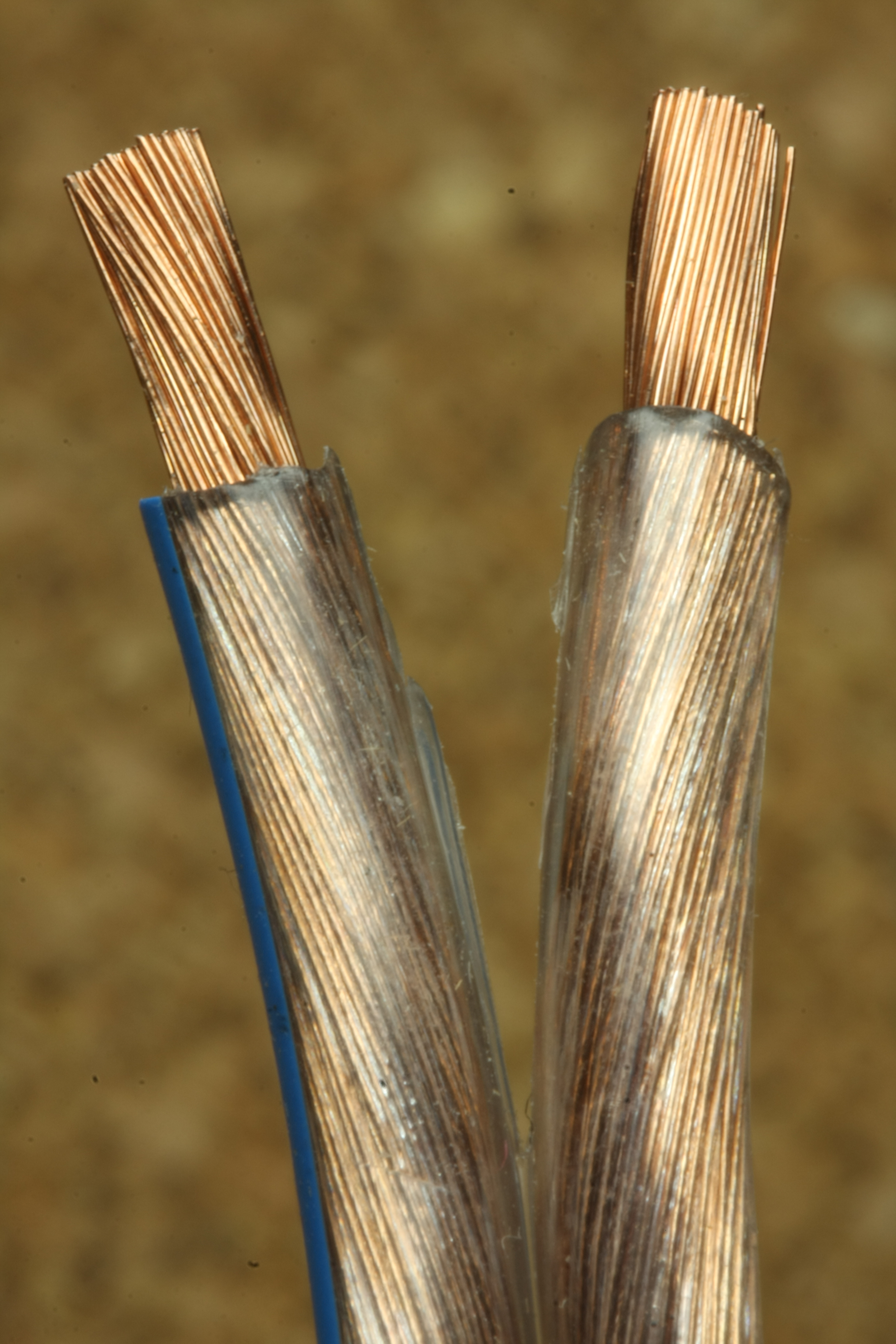 Lautsprecherkabel 1,5mm² in Makroaufnahme mit abisolierten Enden und Polmarkierung